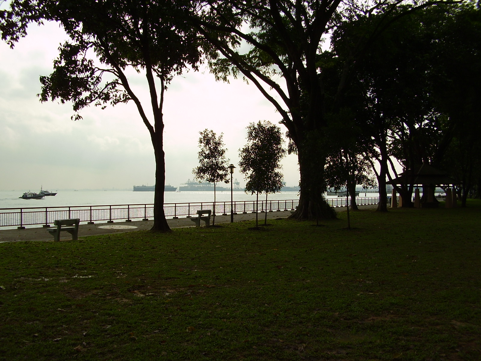 Labrador Park.